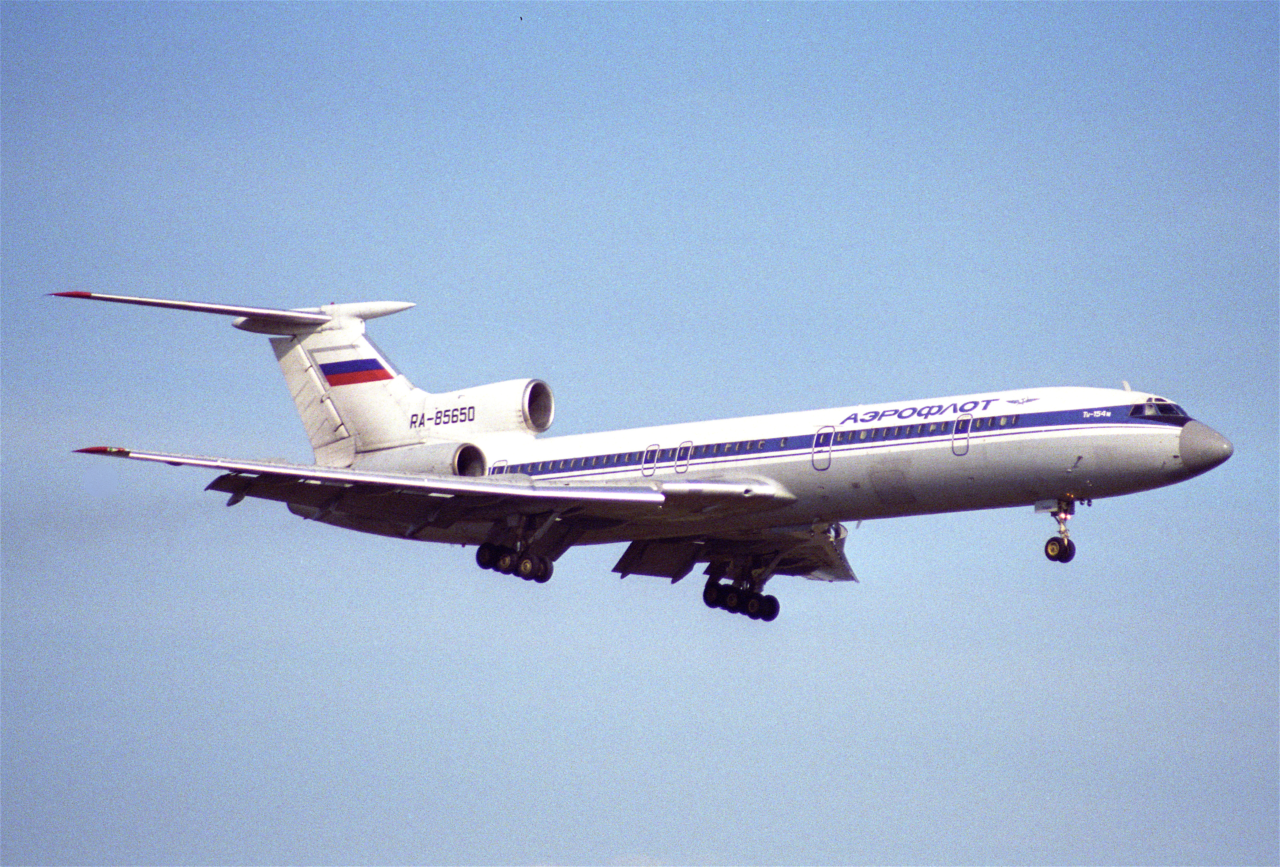 Aeroflot Tupolev 154M;RA-85650@ZRH;08.02.1997